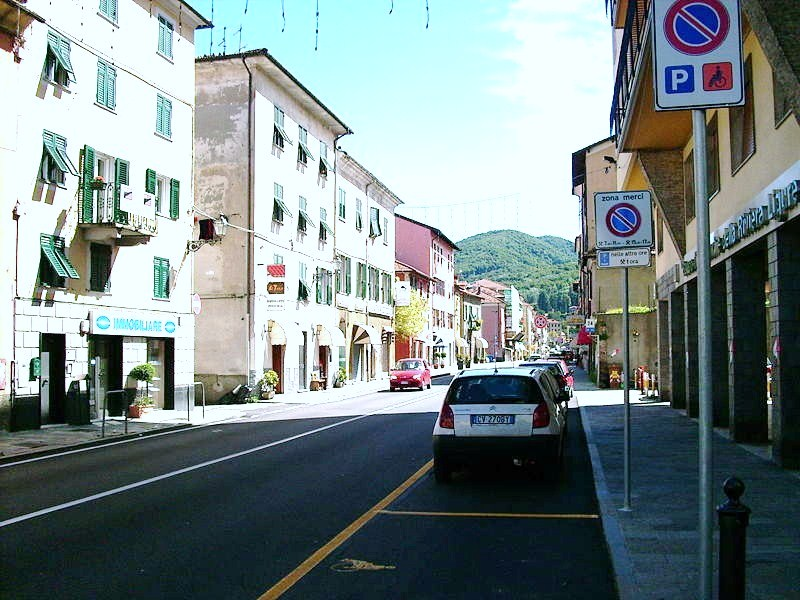 Busalla, Liguria, Italia